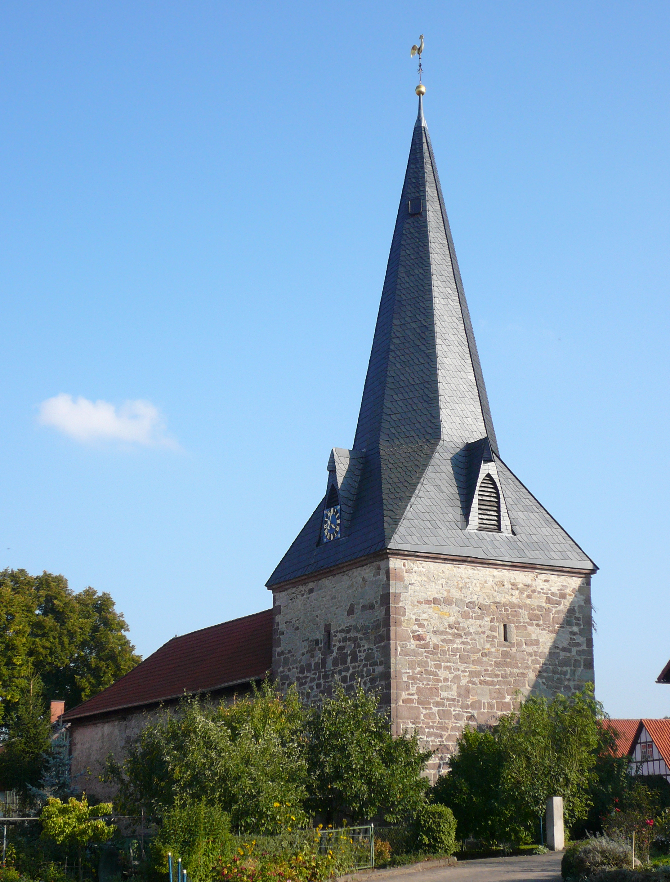 Ev.-luth. Kirche St. Laurentius in Barlissen, Gemeinde Jühnde, Niedersachsen. Turm im Kern gotisch mit Spitzhelm des 19. Jahrhunderts